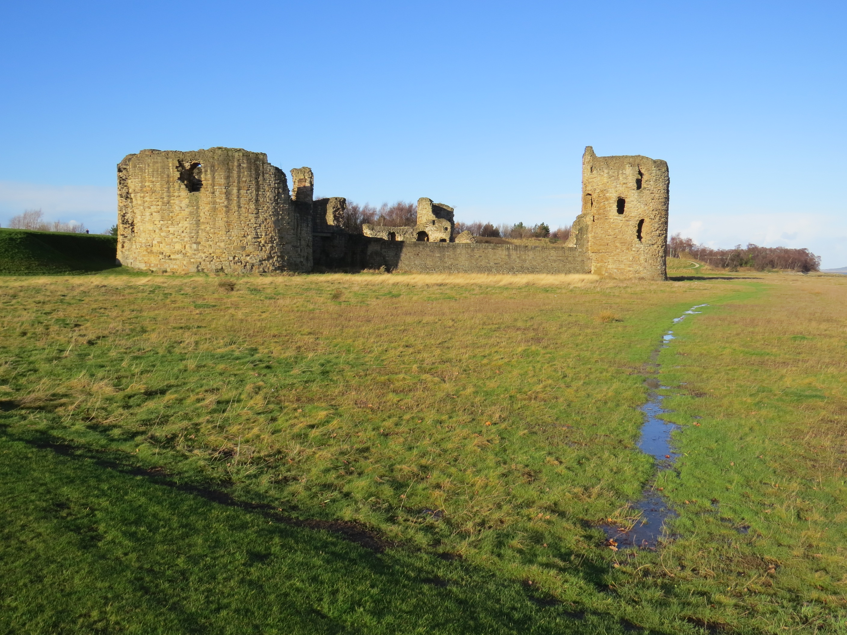 Castell y Fflint